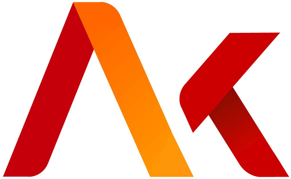 Aktuaalne kaamera lühend AK